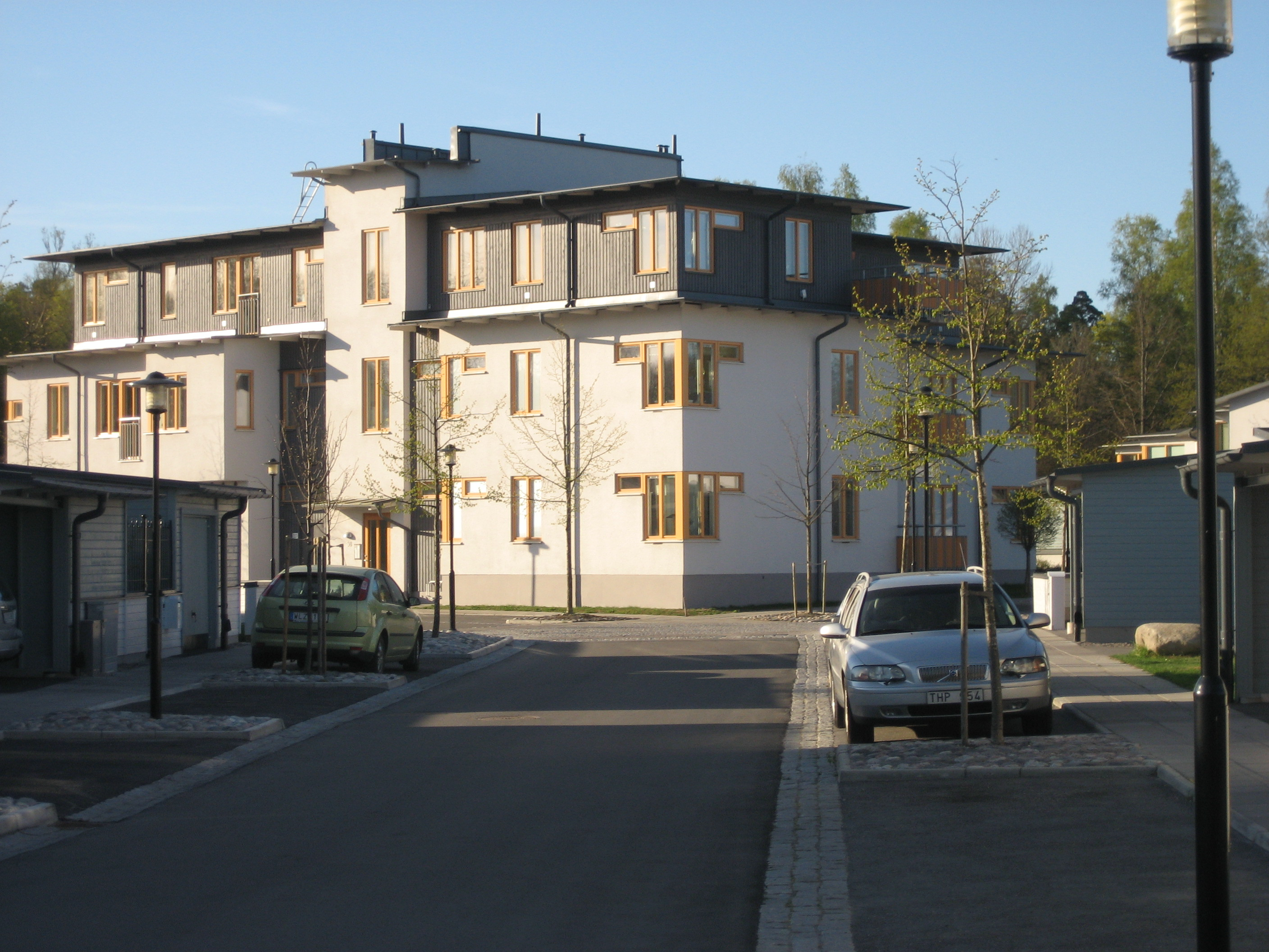 Parkstaden of Örebro, Sweden